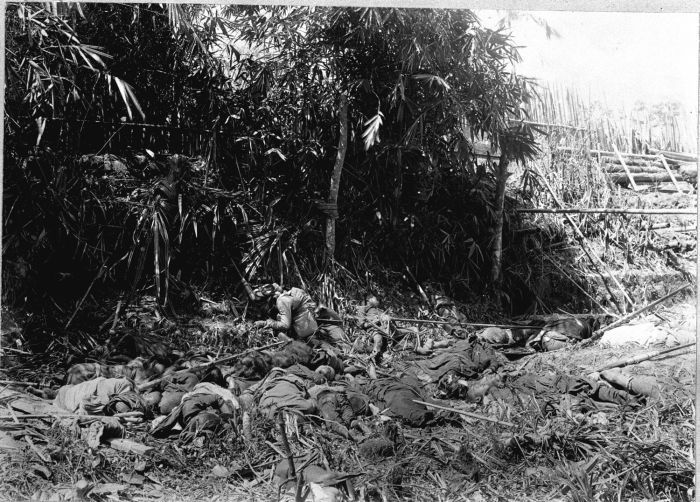 foto. Gezicht in de versterkte kampong Lahat met vermoorde inwoners, na de inname door de marechaussee tijdens de tocht naar de Gajo- en Alaslanden onder leiding van overste Van Daalen